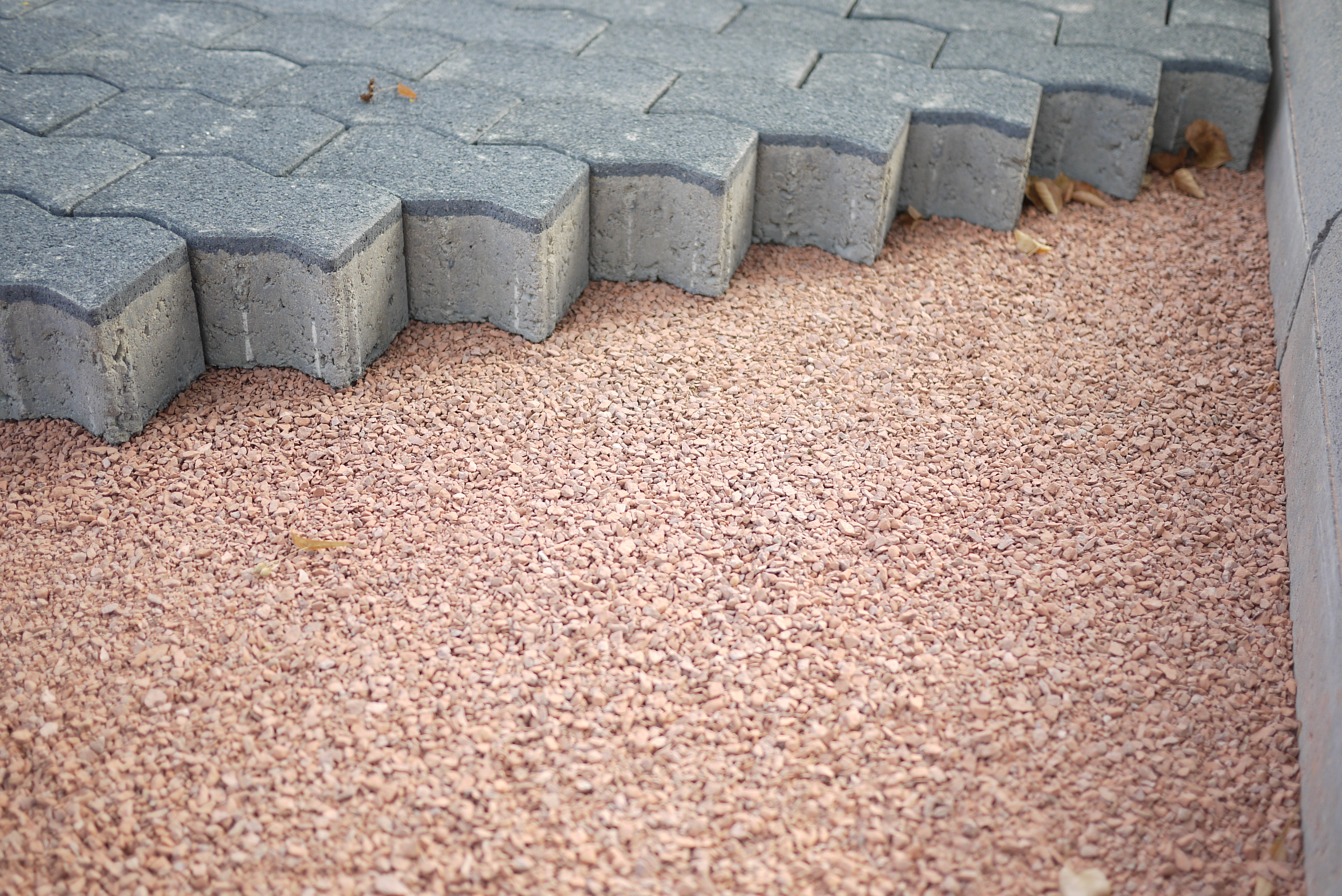 Тротуарная плитка, установленная на гранитный отсев.